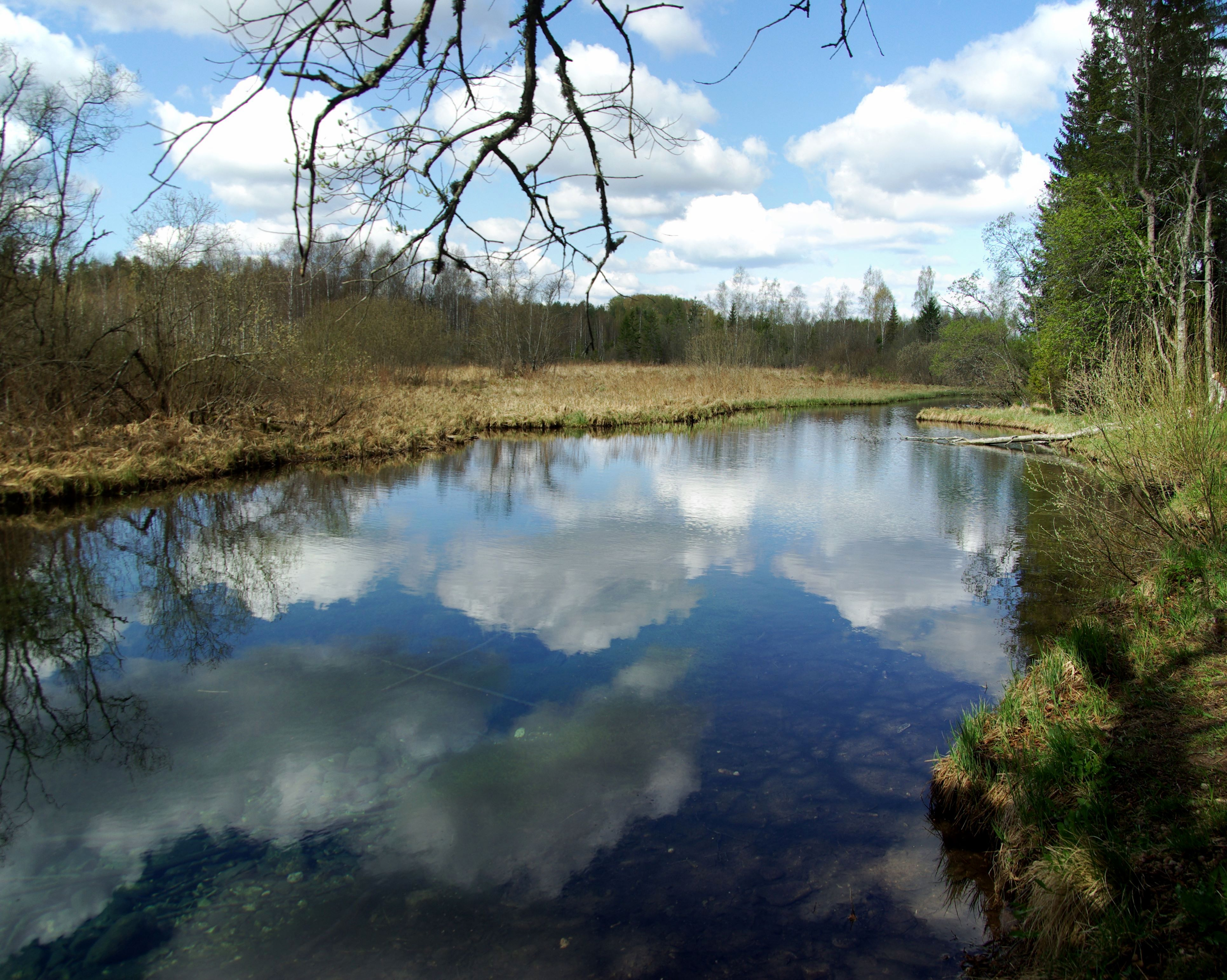 Loodi looduspark